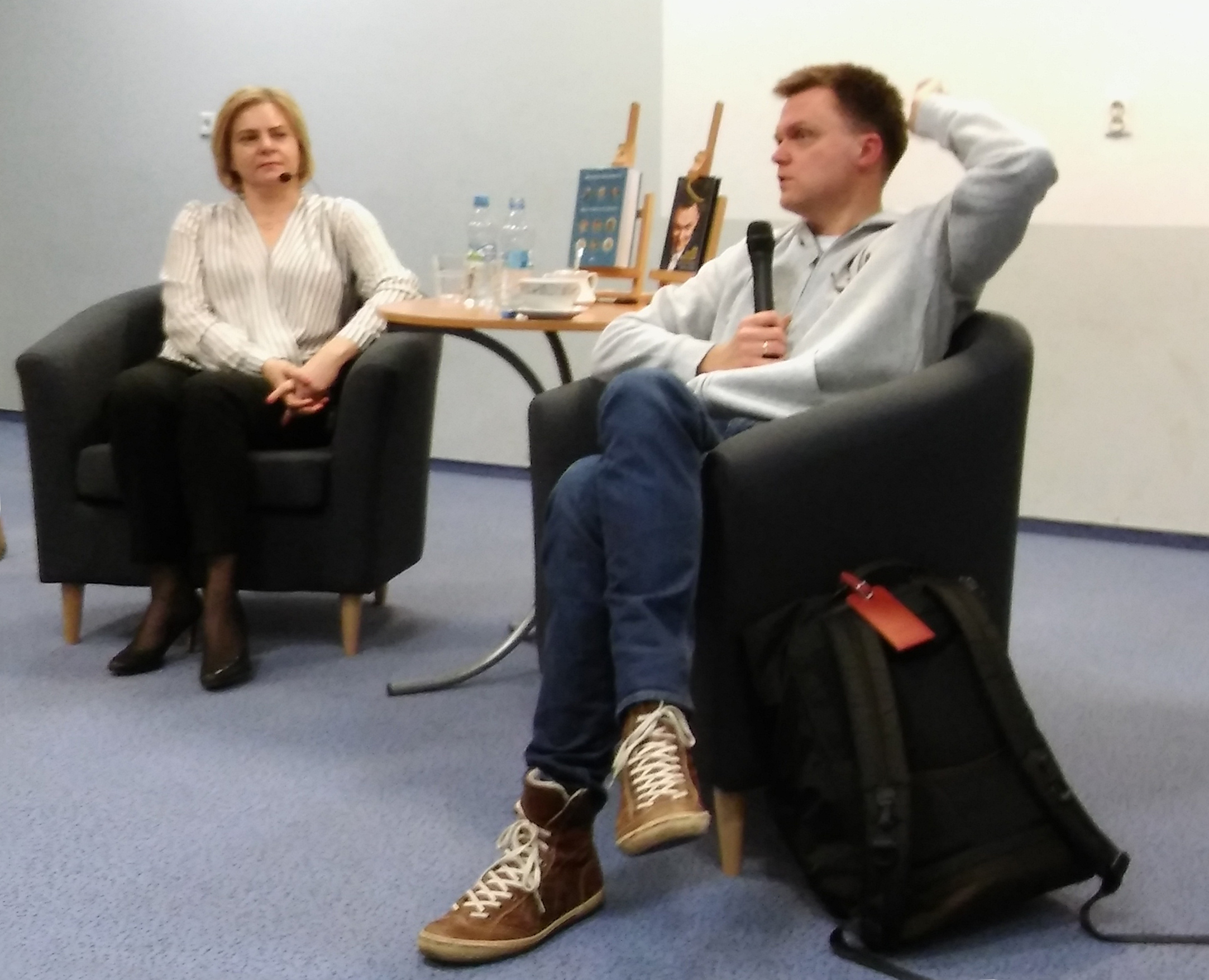 Szymon Hołownia, 21 grudnia 2017 spotkanie autorskie z Szymonem Hołownią w Miejskiej Bibliotece Publicznej w Braniewie